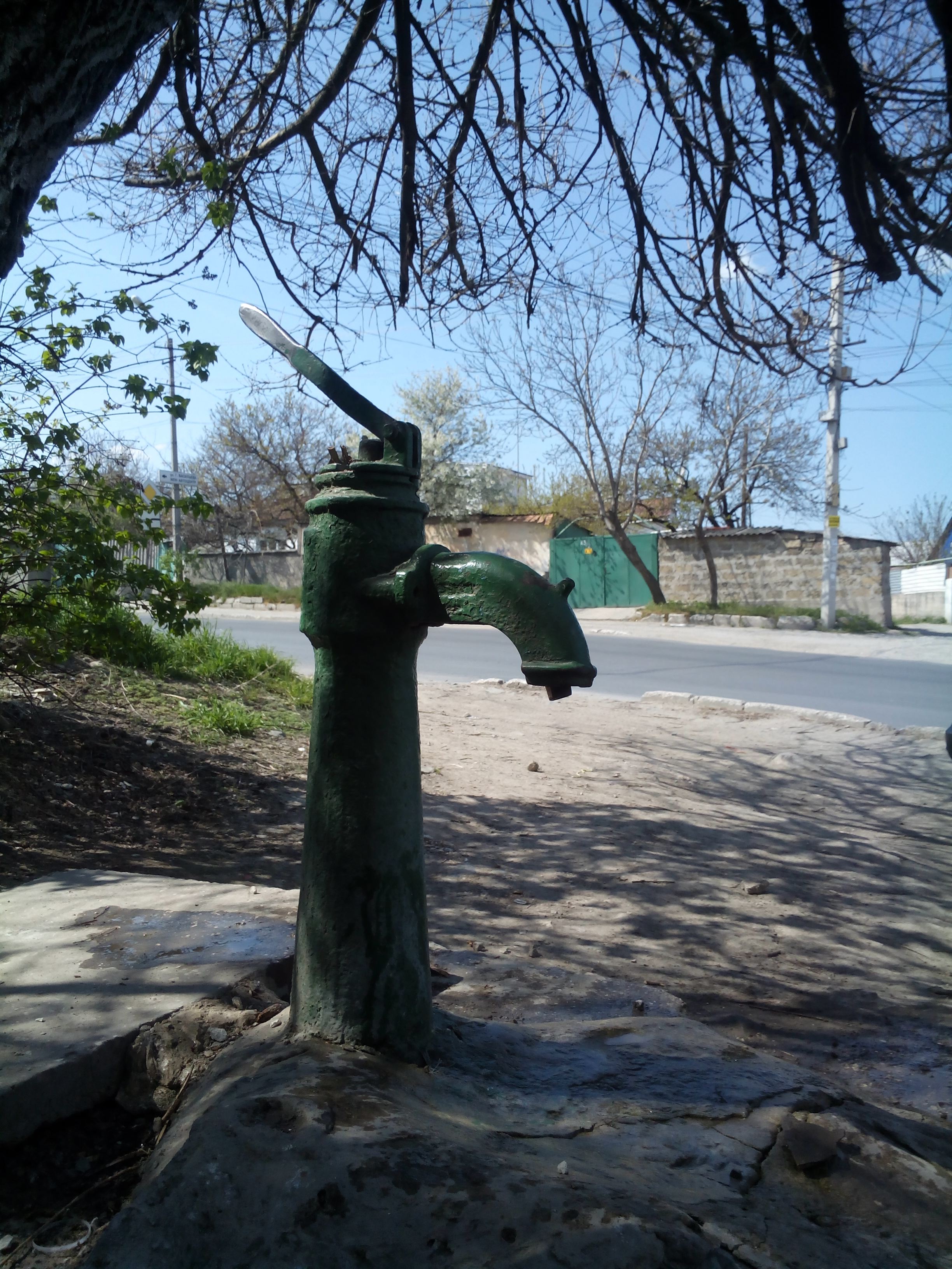 Ручная колонка